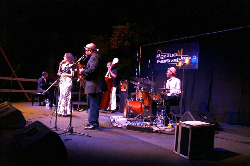 Pozzuoli Jazz Festival - Roberta Gambarini Quintet